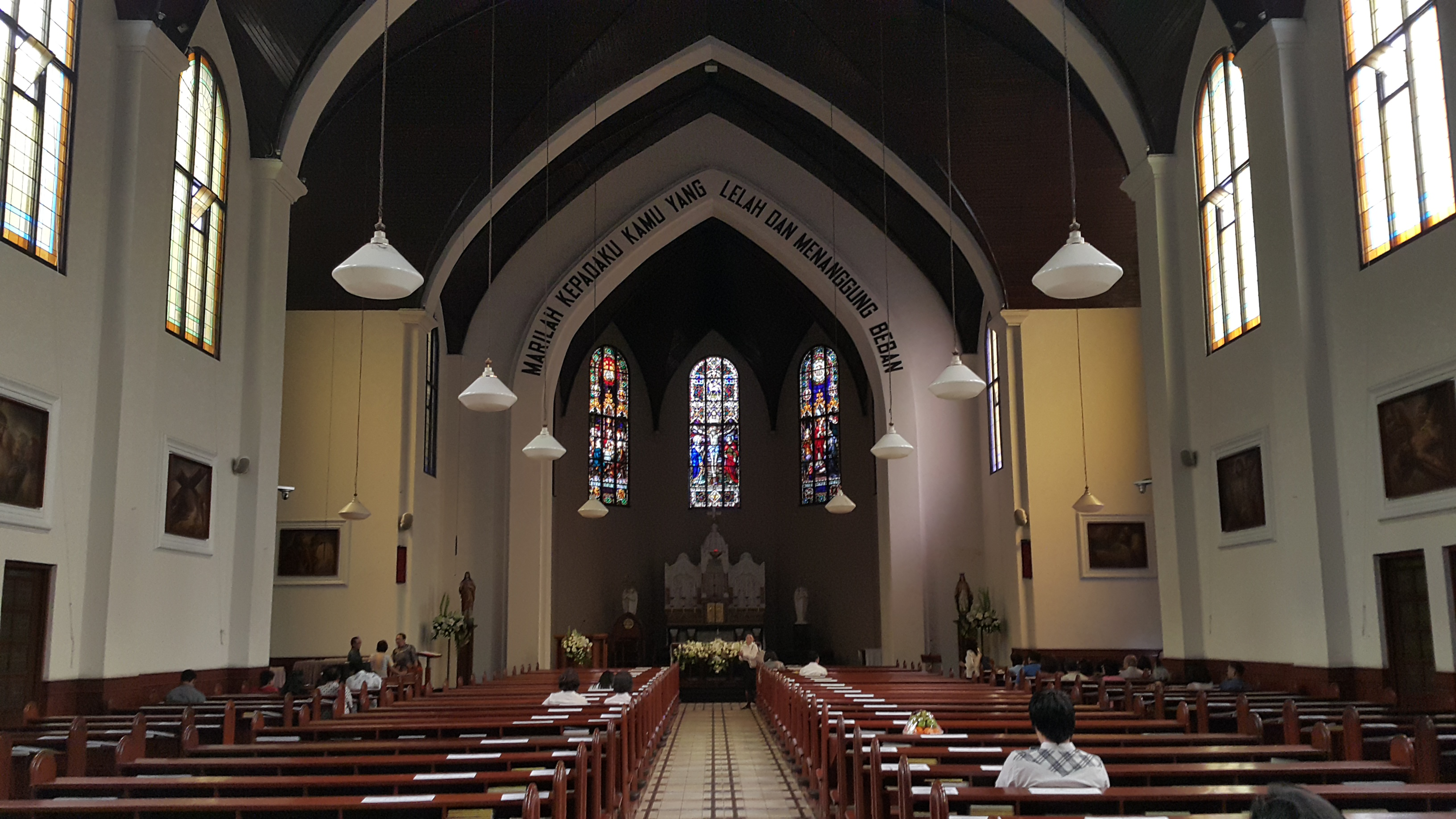 Gereja Katedral Bandung